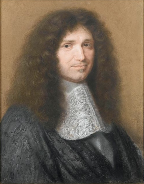 Jean-Baptiste Colbert par Robert Nanteuil, 1676, pastel, 52 x 44 cm, musée Condé, Chantilly, France ; inventaire PE343.